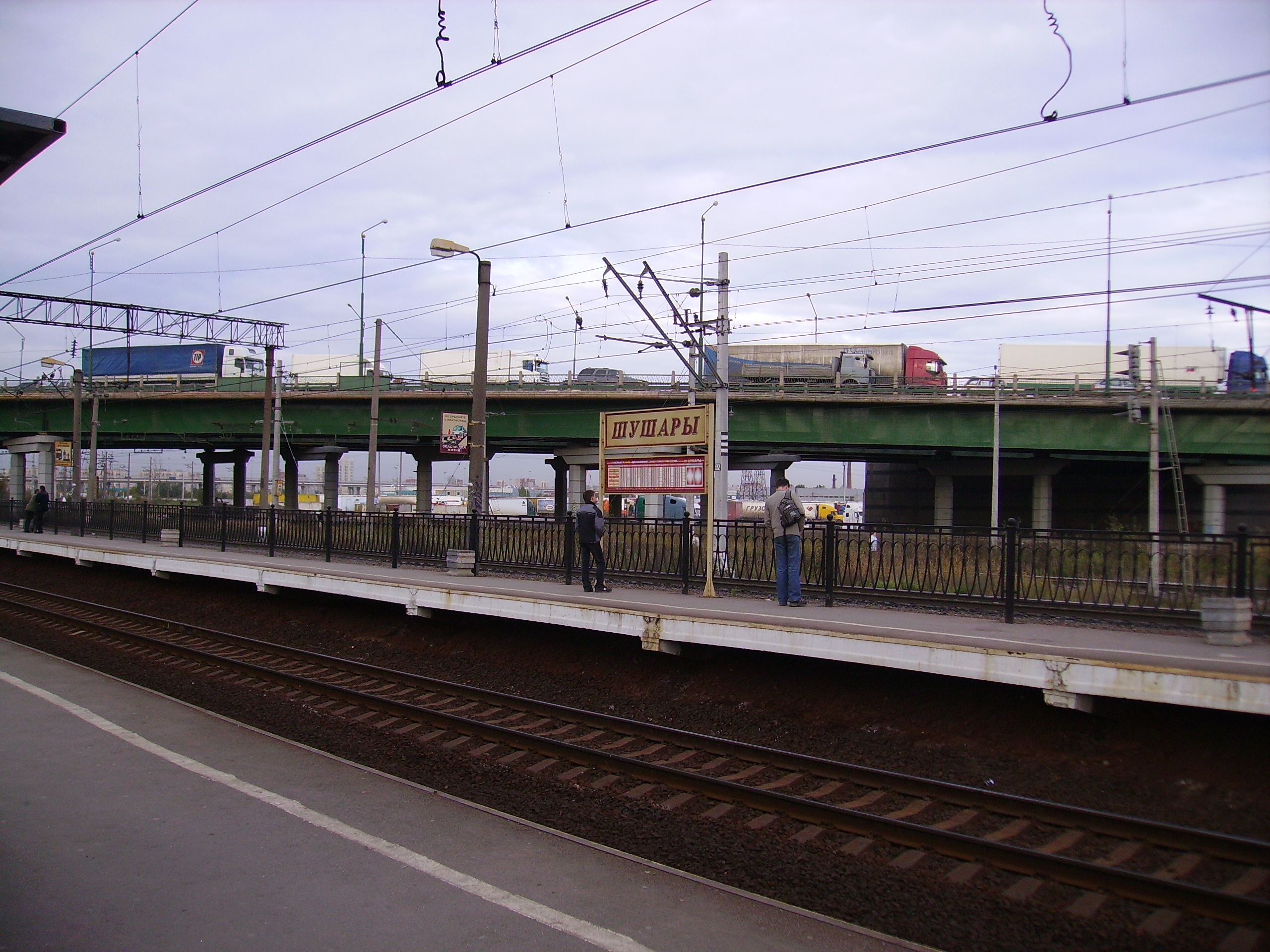 Железнодорожная станция «Шушары». Платформа. На заднем плане видна пробка на автомобильном путепроводе.